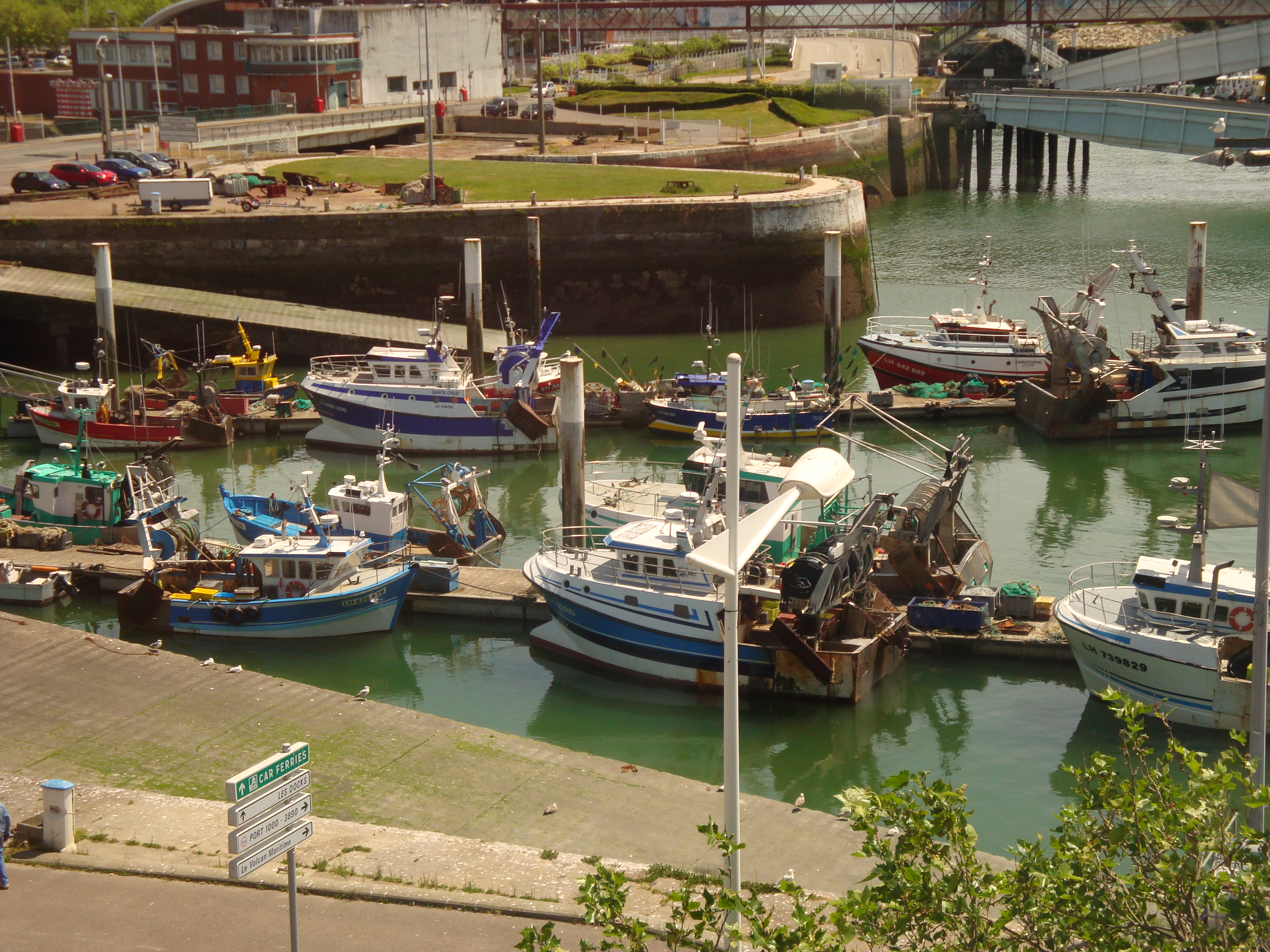 Quai de l'ïle, Chalutiers vue depuis la maison de l'armateur